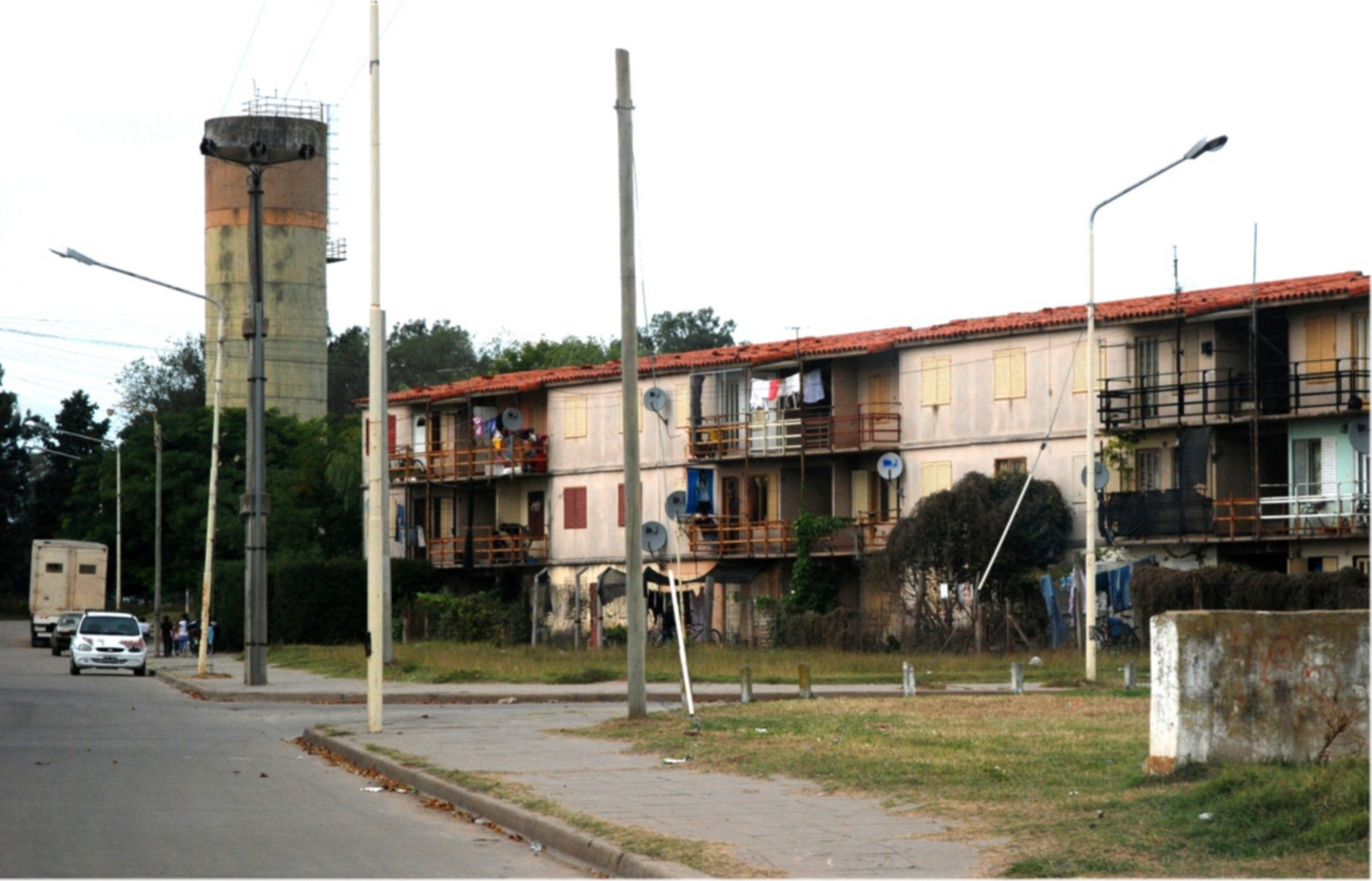 Barrio 512 viviendas en Pergamino, provincia de Buenos Aires, Argentina